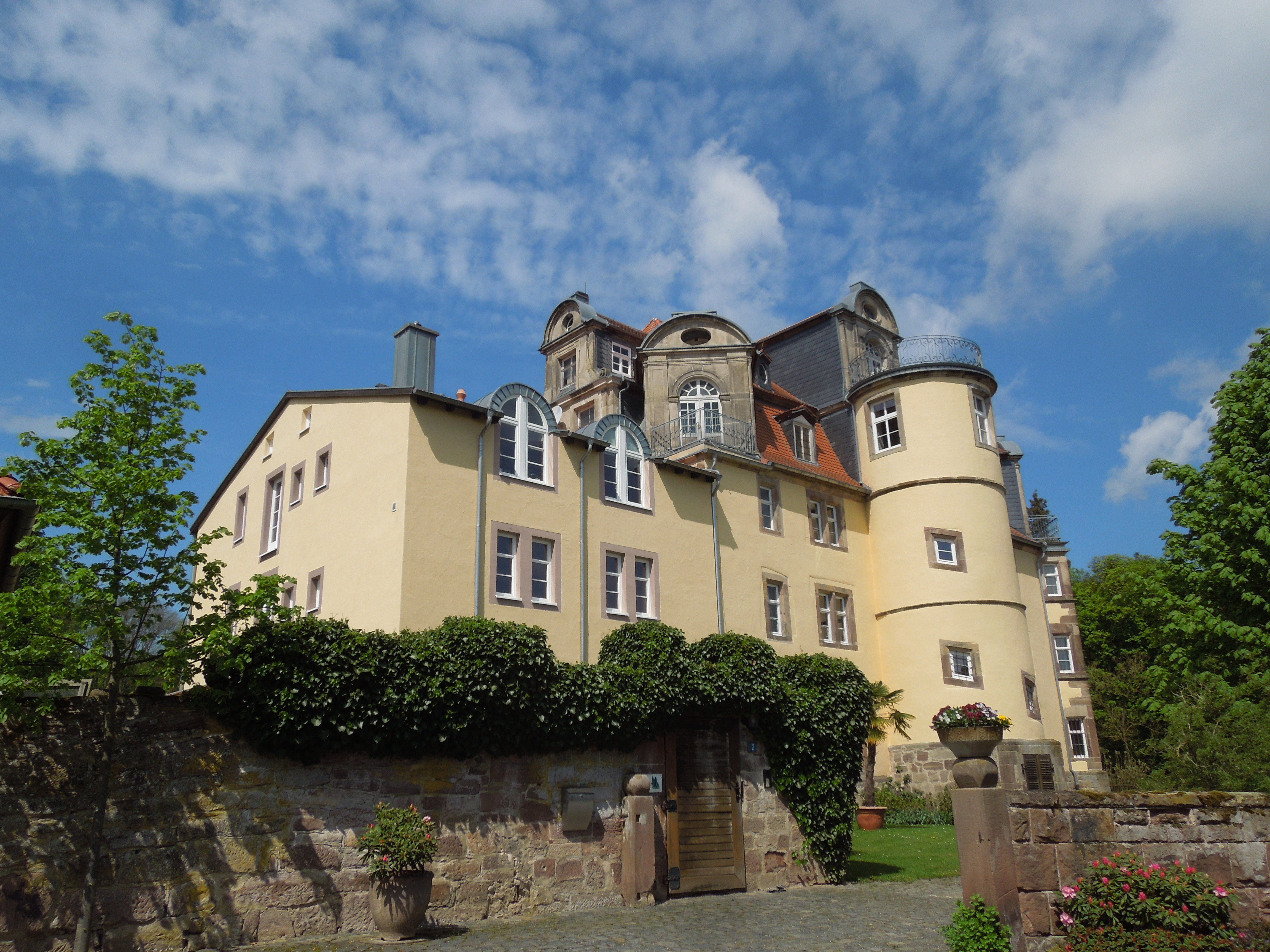 Das buttlarsche Schloss in Riede (2017)